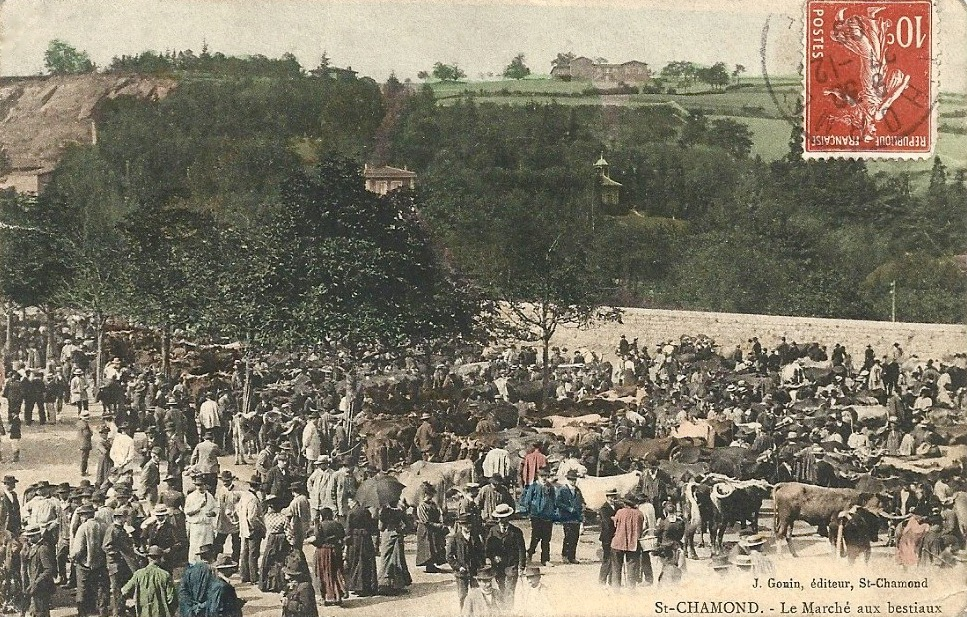 Saint-Chamond (Loire), affluence au marché aux bestiaux, carte postale ancienne (non grevée de droits).